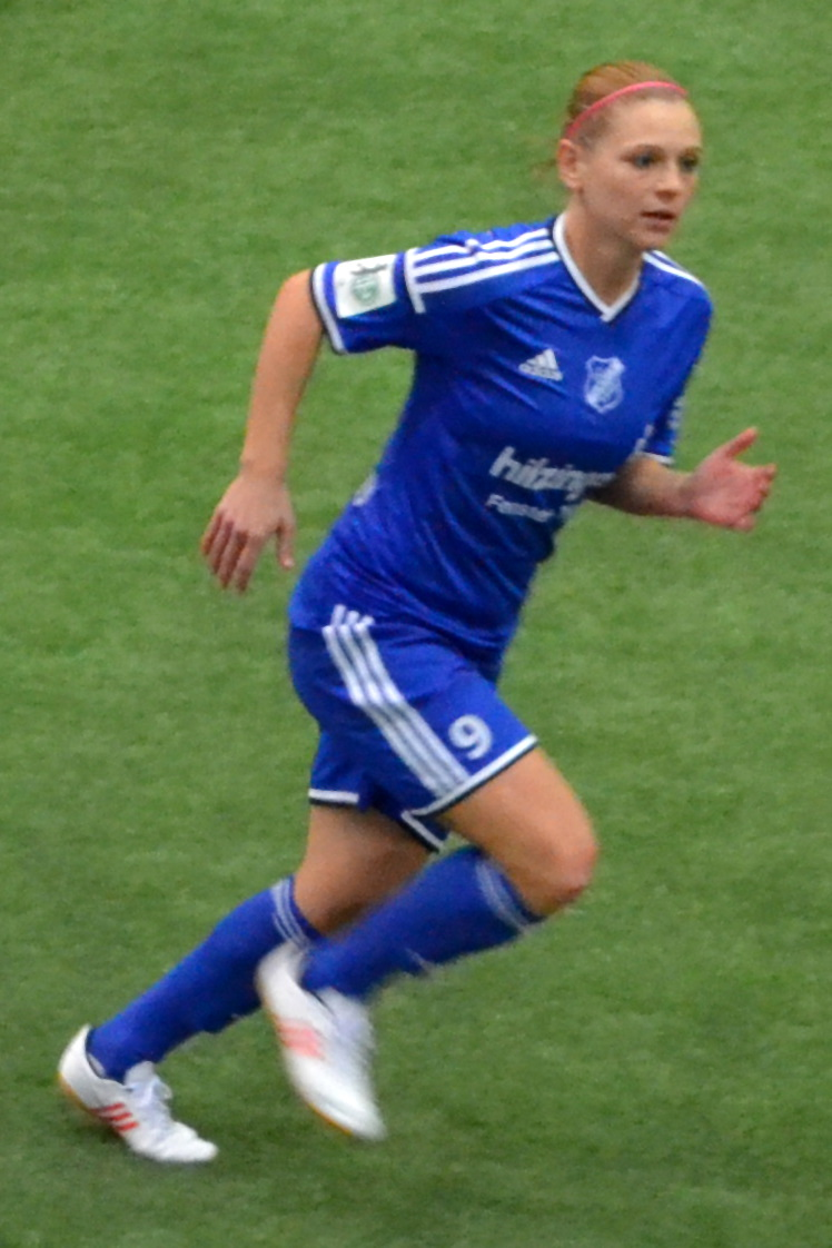 Christine Veth (SC Sand) beim SAP Frauen-FußballCup 2016